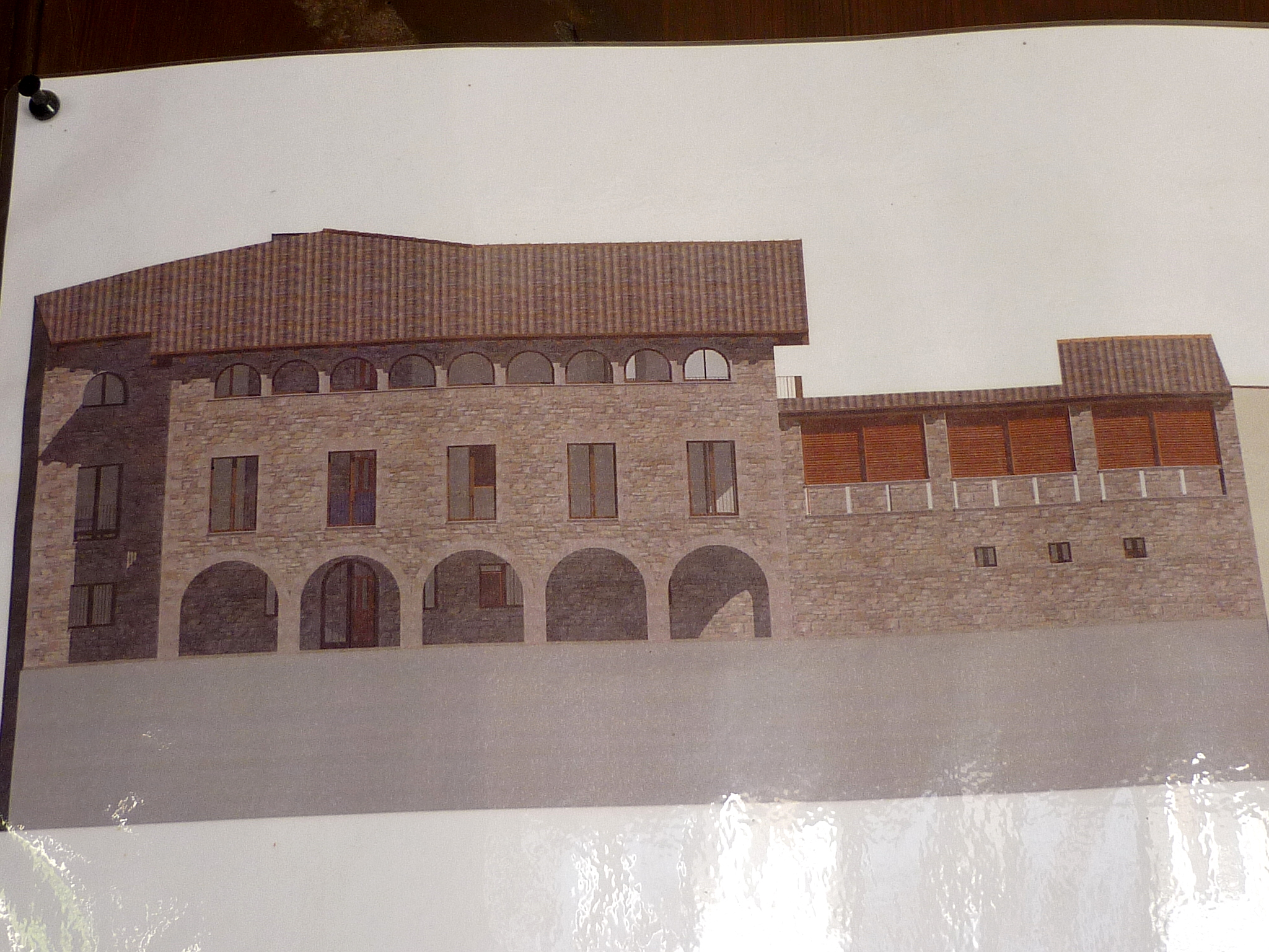 Cal Masdeuró (Sanaüja): projecte de reconstrucció